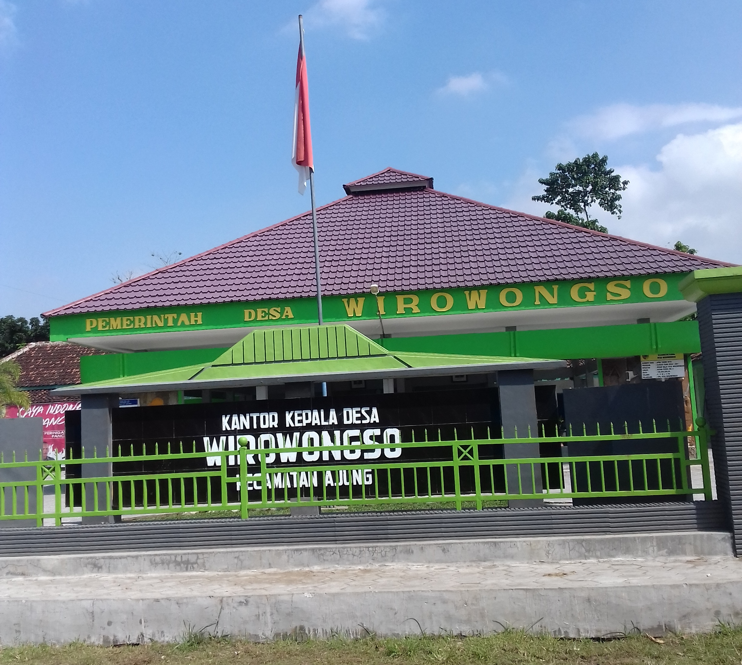 Tampak depan Kantor Kepala Desa Wirowongso